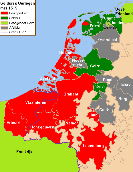 Overzicht van de Gelderse oorlogen in mei 1515, nadat George van Saksen Friesland aan Karel V (HRR) heeft verkocht.